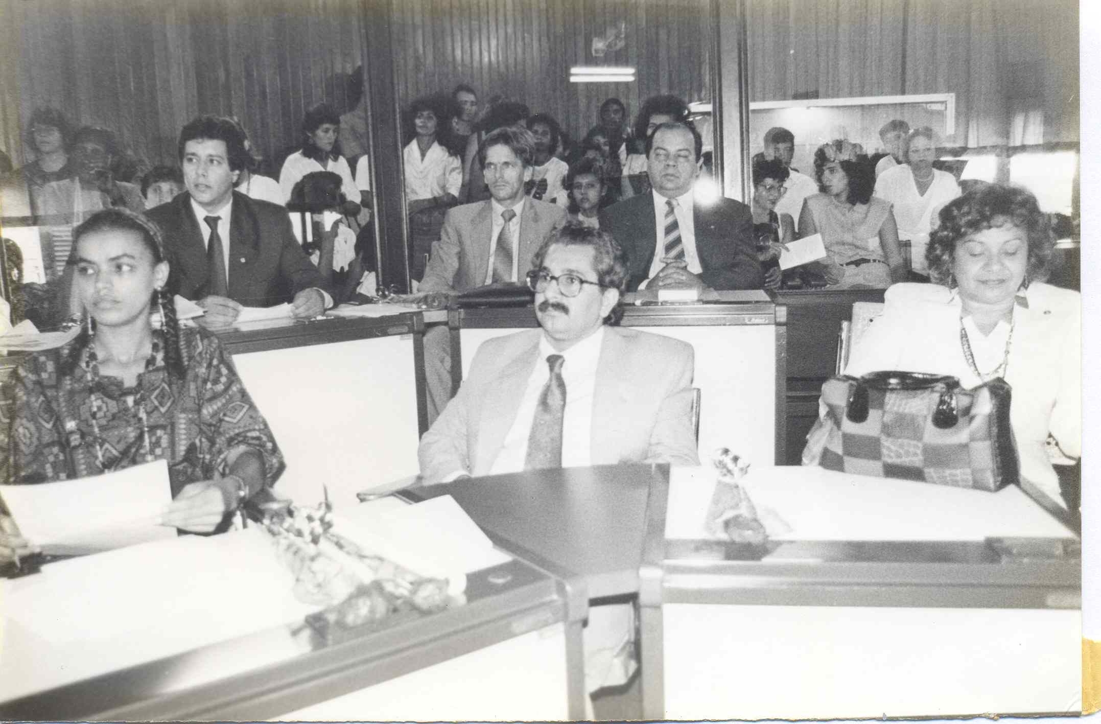 Marina Silva na Assembleia - Acre (08/03/1991)